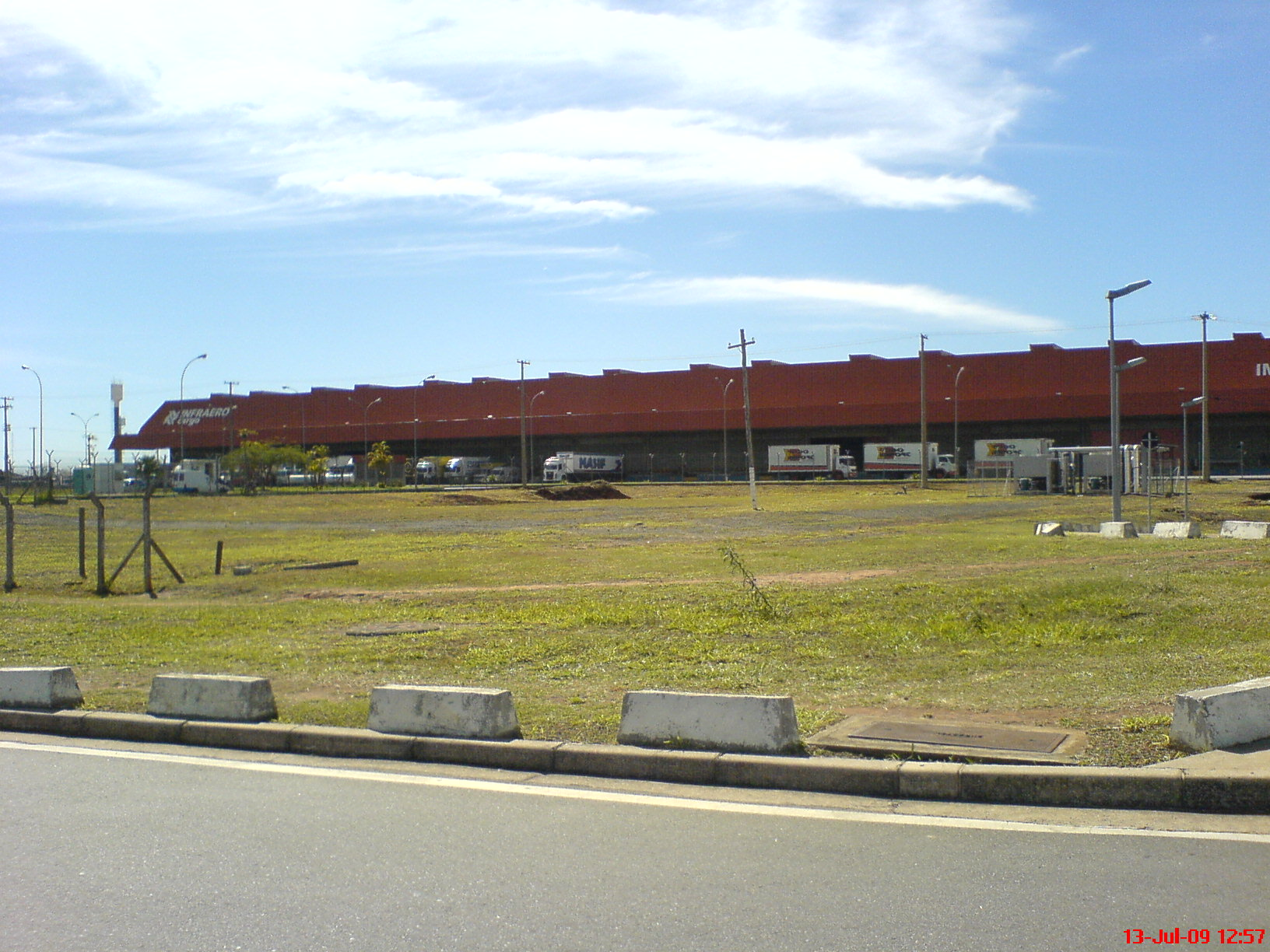 Deposito de Exportaçao - Aeroporto de Viracopos